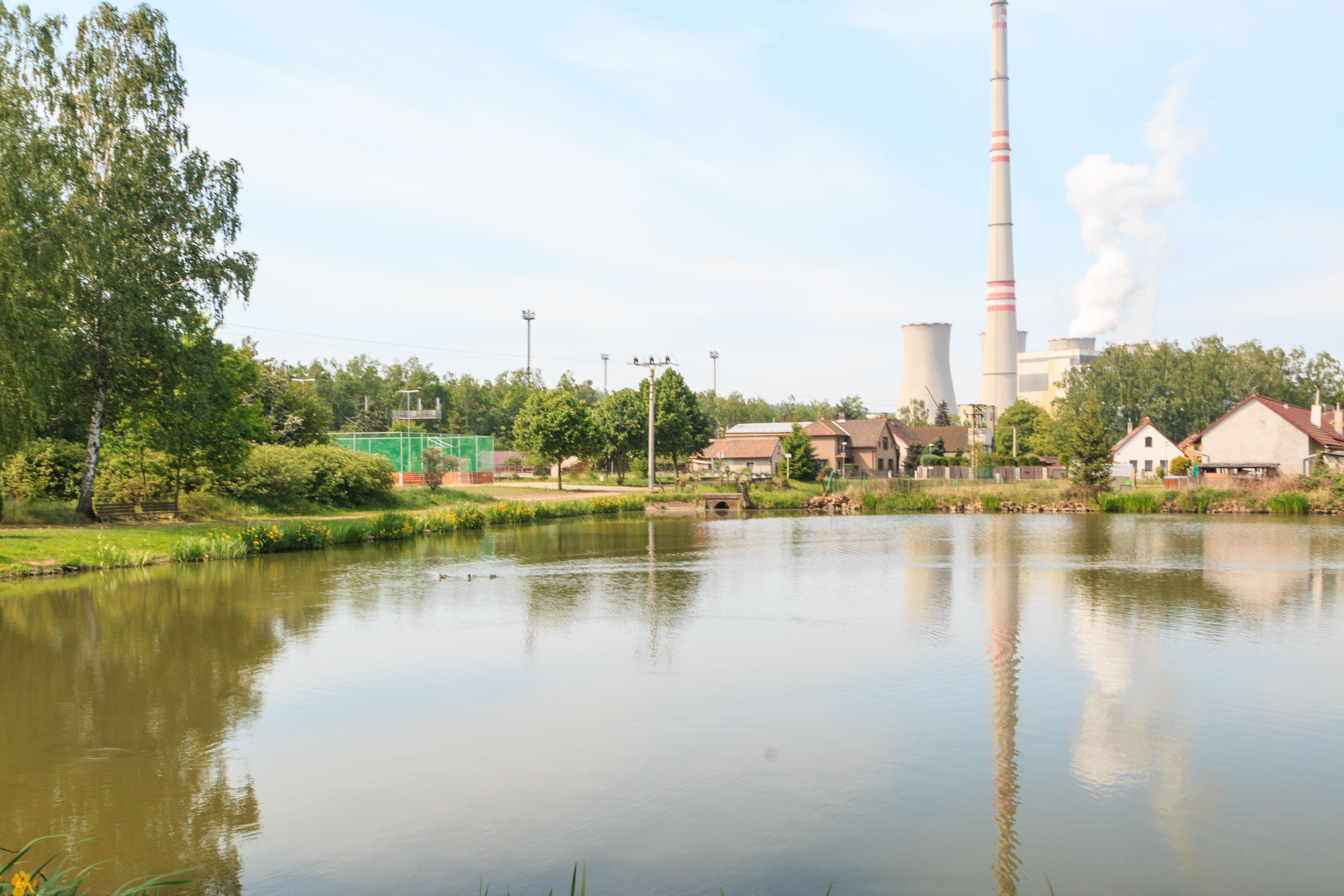 Rybník v Trnávce Project: Vodstvo.